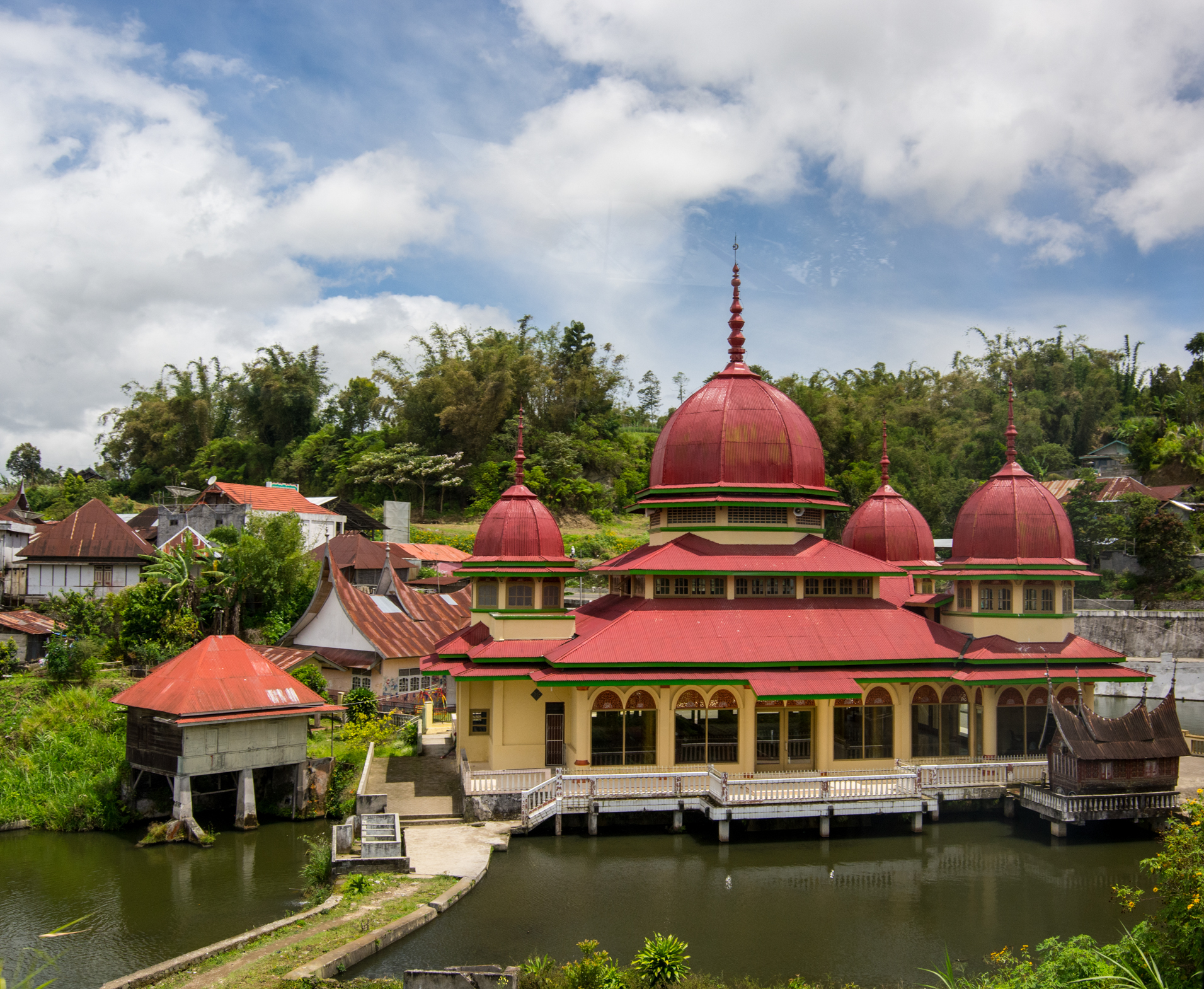 Masjid Darussalam Bukittinggi